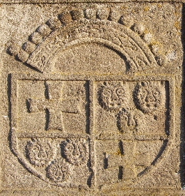 Kommende Ramersdorf: gevierteiltes Wappen auf dem „Kommendekreuz“ mit dem Kreuz des Deutschen Ordens und drei Löwen des Bocholtz'schen Wappens